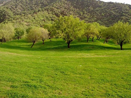 تصویری از روستای زیبای دره اناران در استان لرستان در منطقه پاپی